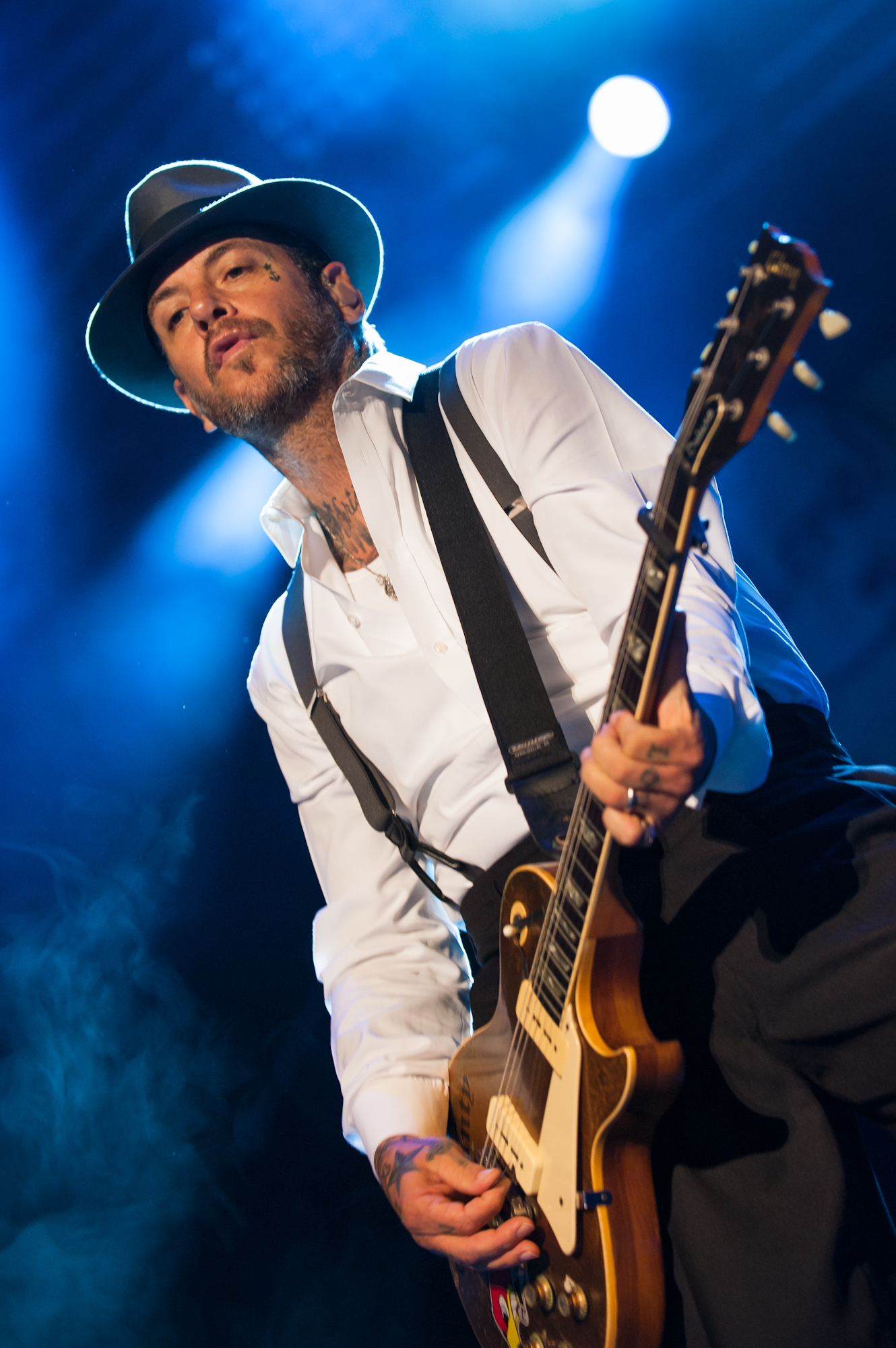 Mike Ness, Sänger und Gitarrist von Social Distortion beim Festival, Rocco del Schlacko 2012.